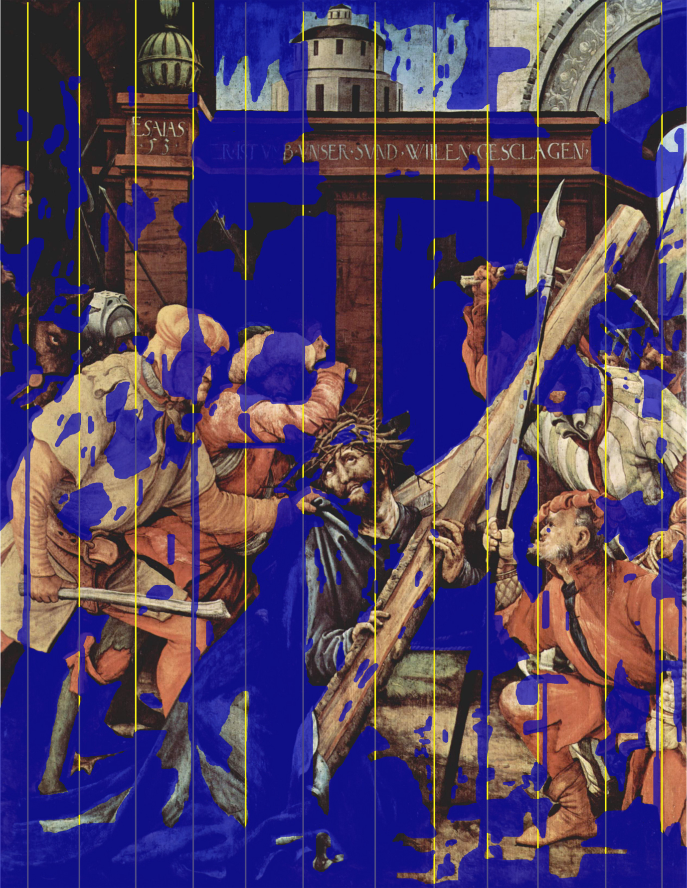 Kreuztragung des Tauberbischofsheimer Altars: Anordnung der Tannenholzbretter des Bildträgers (gelb) und Schadenskartierung der Übermalungen (blau) nach den Angaben von Karin Achenbach-Stolz (Die „Kreuztragung“ von Matthias Grünewald aus restauratorischer Sicht. In: Staatliche Kunsthalle Karlsruhe (Hg.): Grünewald und seine Zeit. München, Berlin, 2007, S. 104–115)